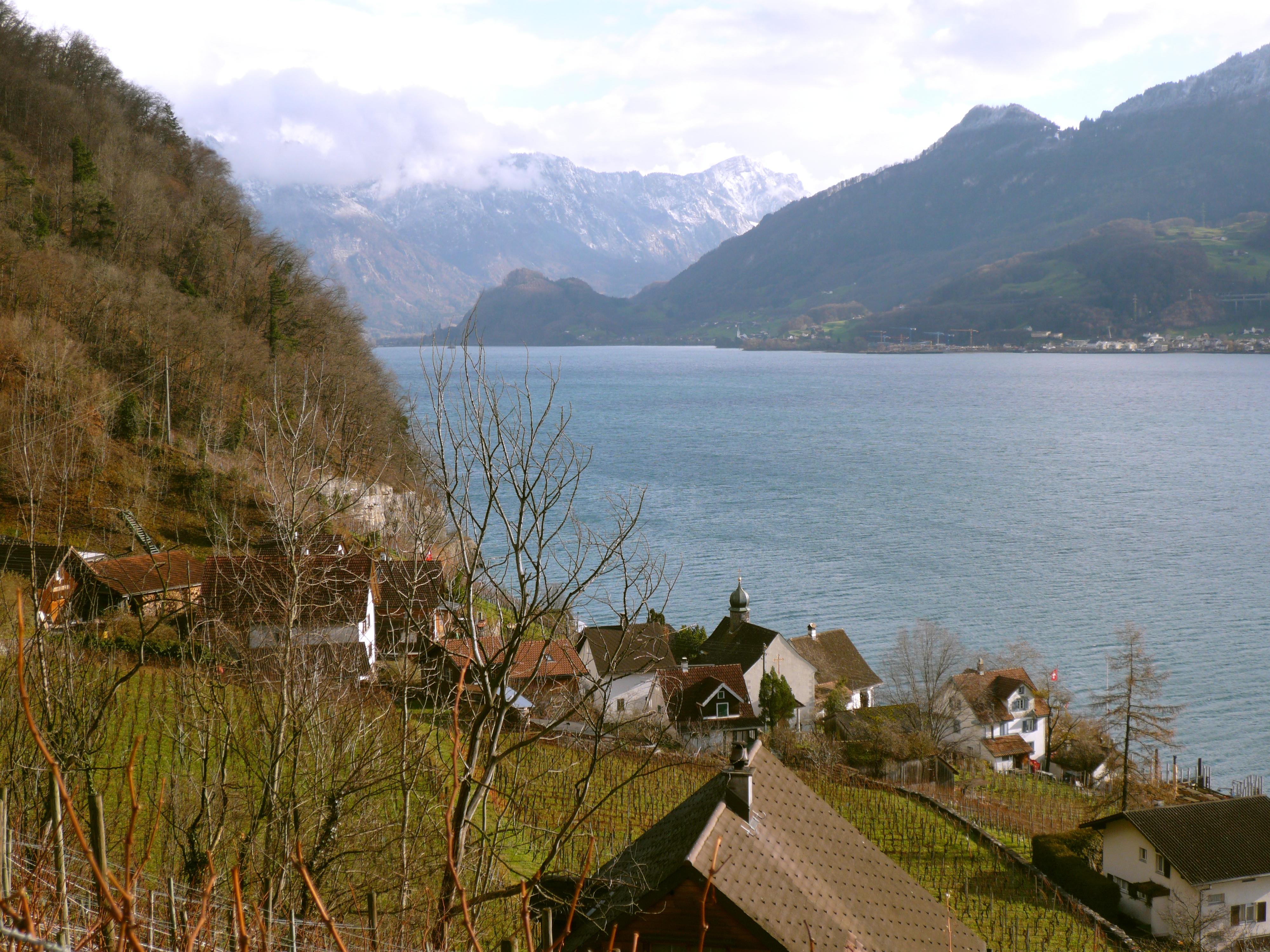 Quinten, Switzerland